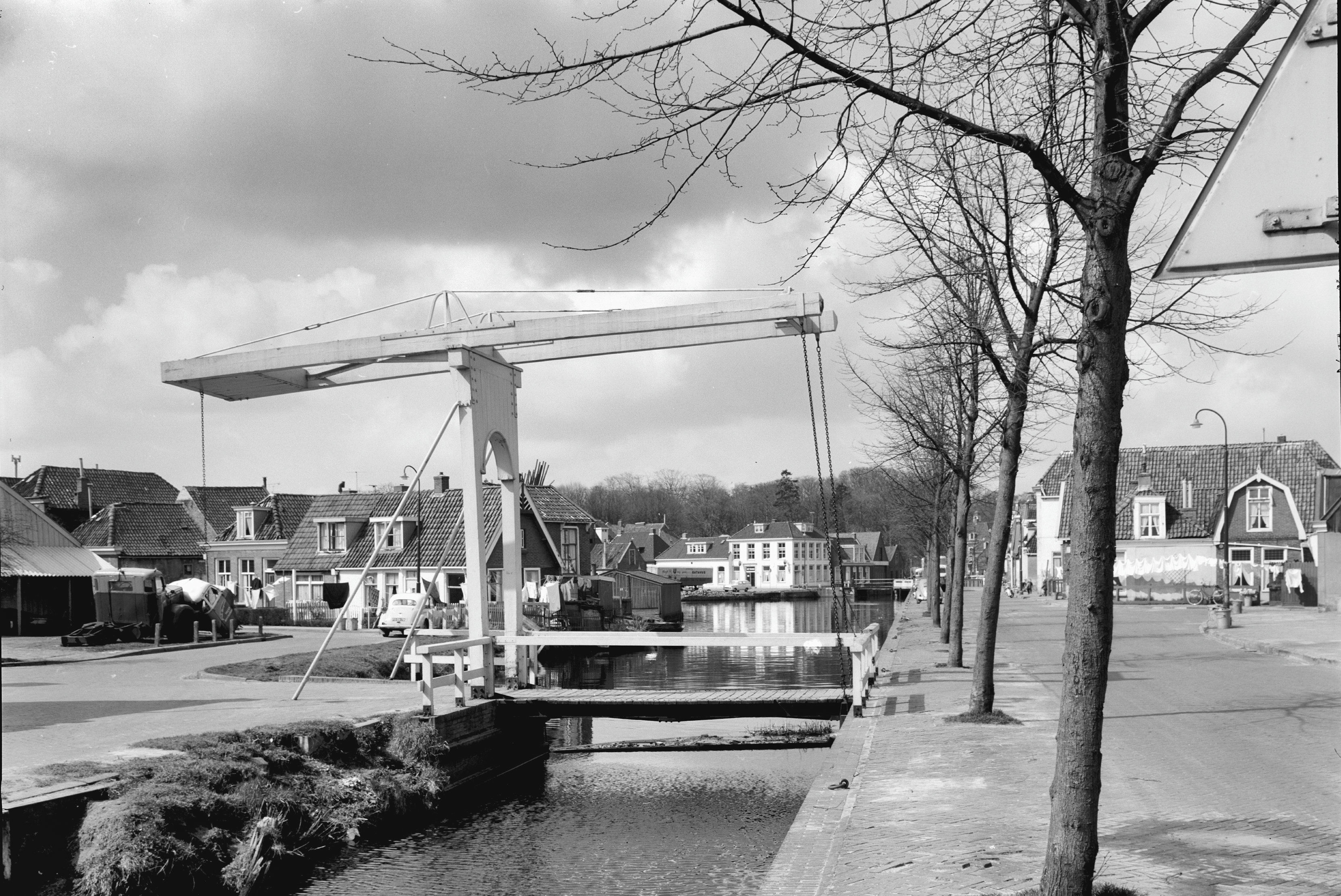 brug